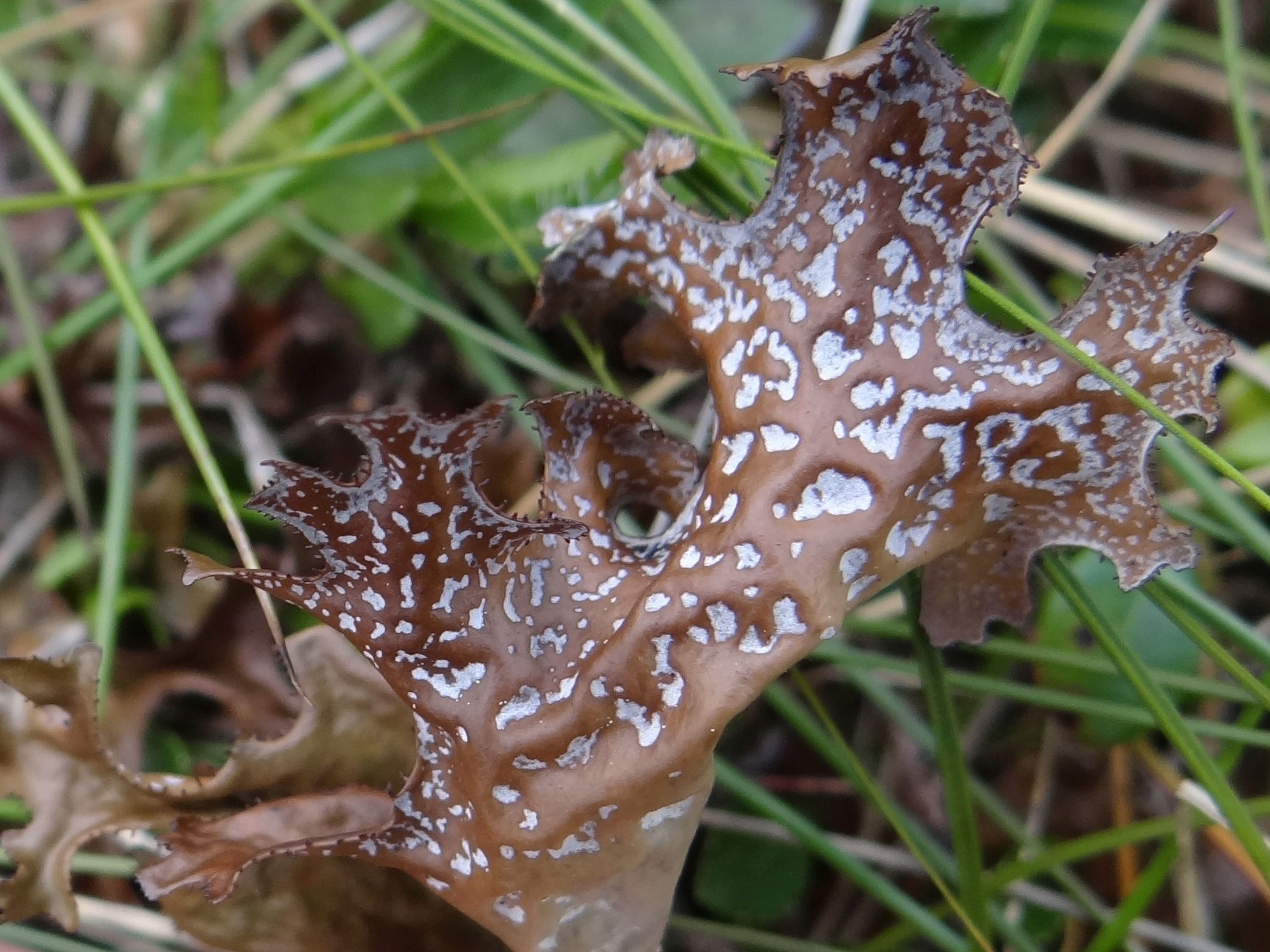 Cetraria islandica (location:Slovakia, Tatry Nizne, Chopok)